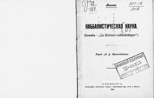 Каббалистическая наука. 1913